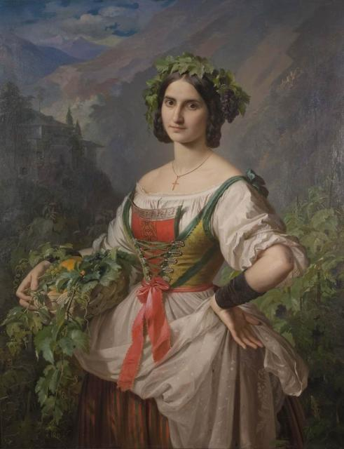 Жозефина Сверчкова, жены художника Владимира Дмитриевича Сверчкова, изображенна в тирольском костюме в аллегорическом образе Осени.